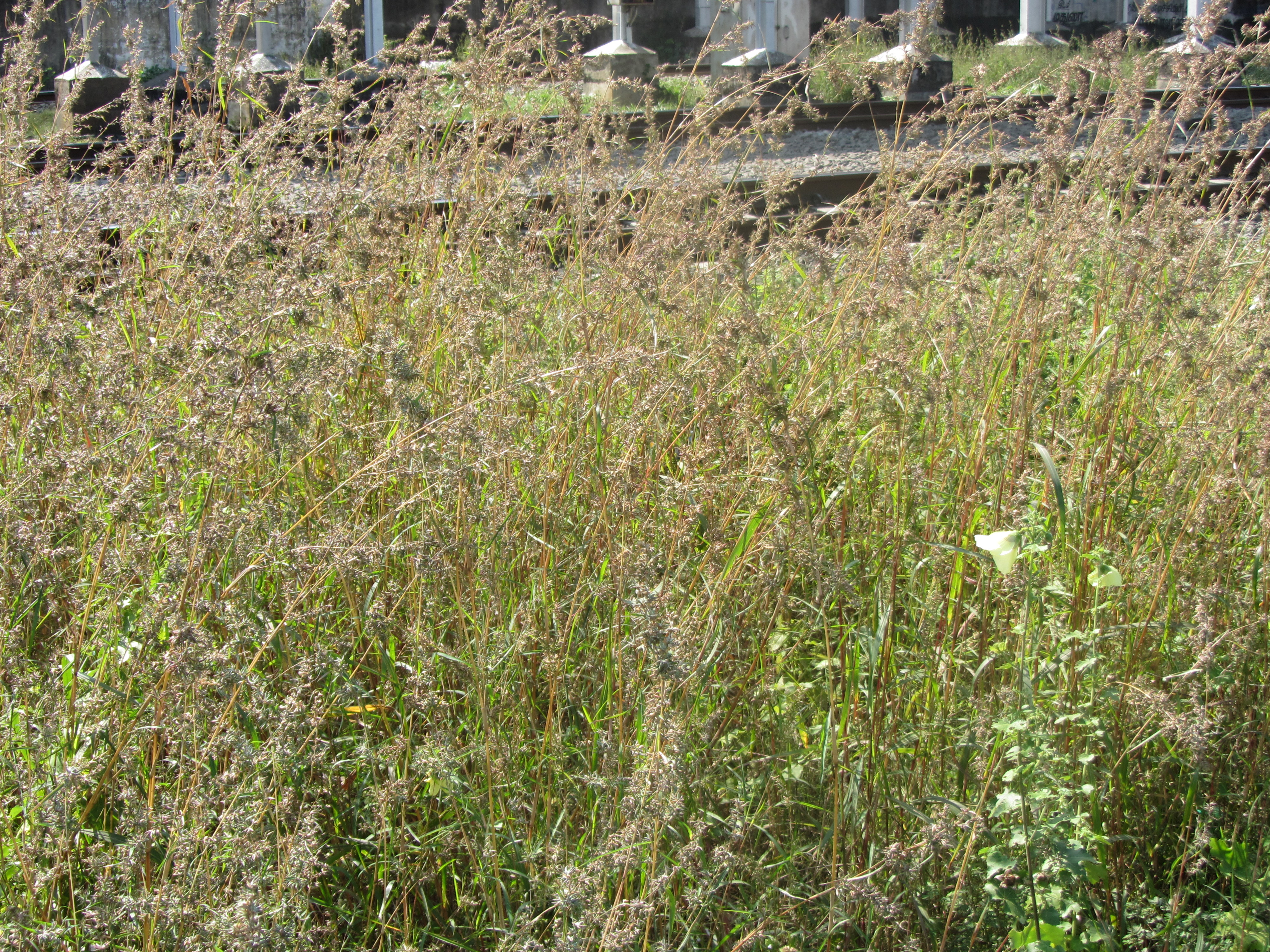 கறுக்கட்டான் புல் கூரை வேயப் பயன்படும். இதனால் வேயப்பட்ட குடிசையைச் சங்கப்பாடல் 'புல்வேய் குரம்பை' எனக் குறிப்பிடுகிறது. own shot